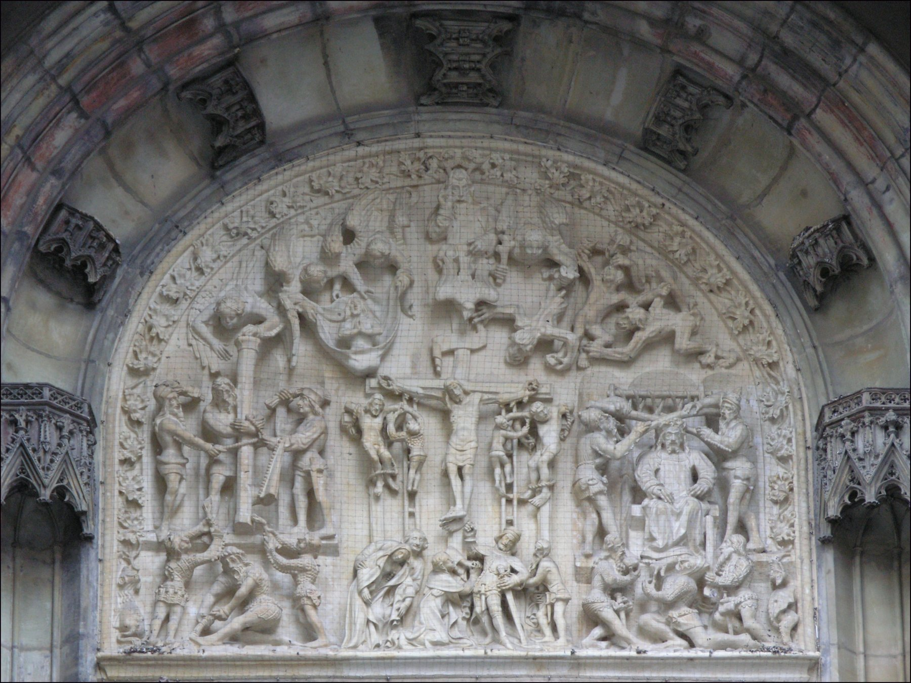 Gotický reliéf - Kristovy pašije - severní portál Týnského chrámu